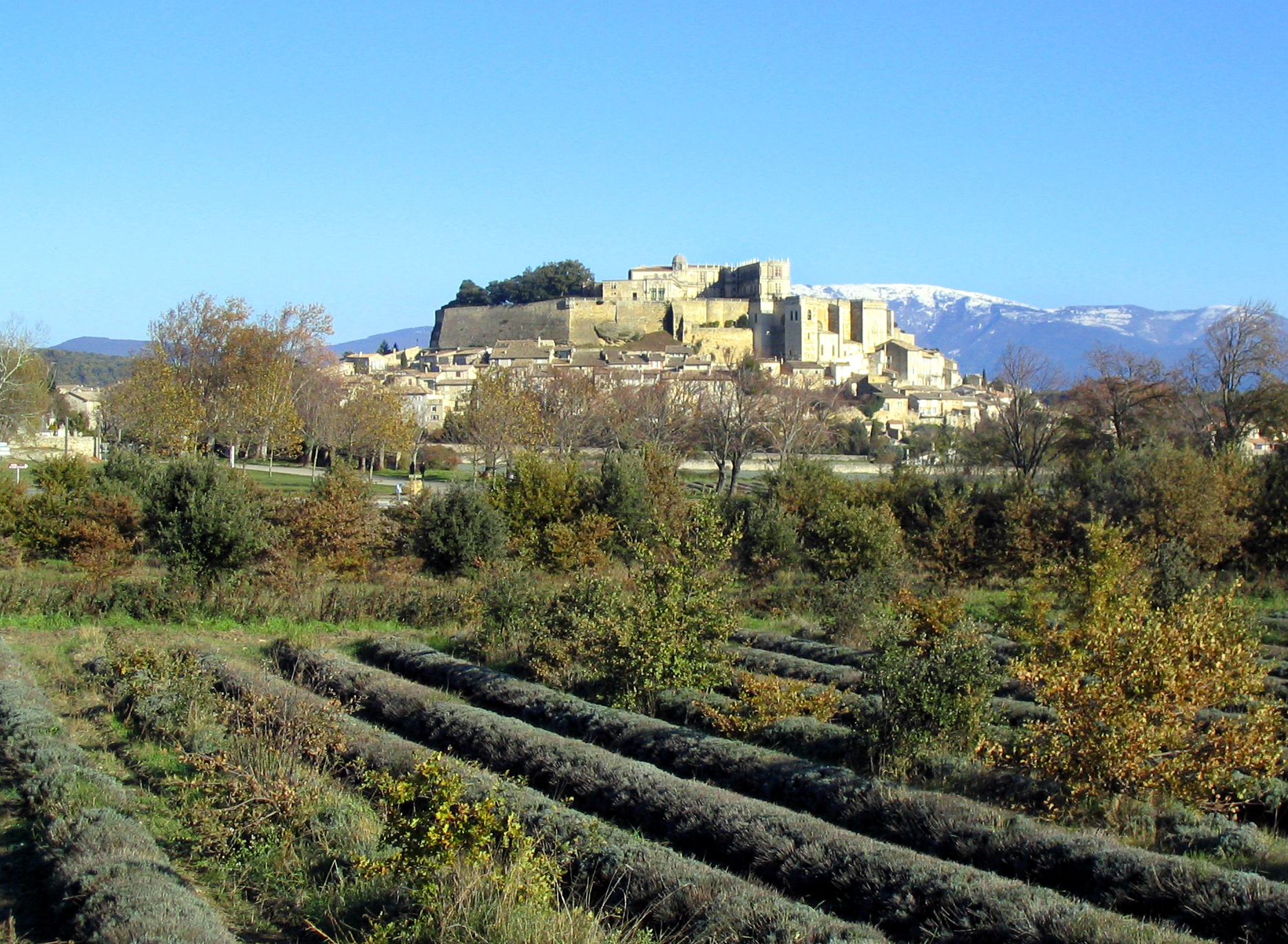 Grignan